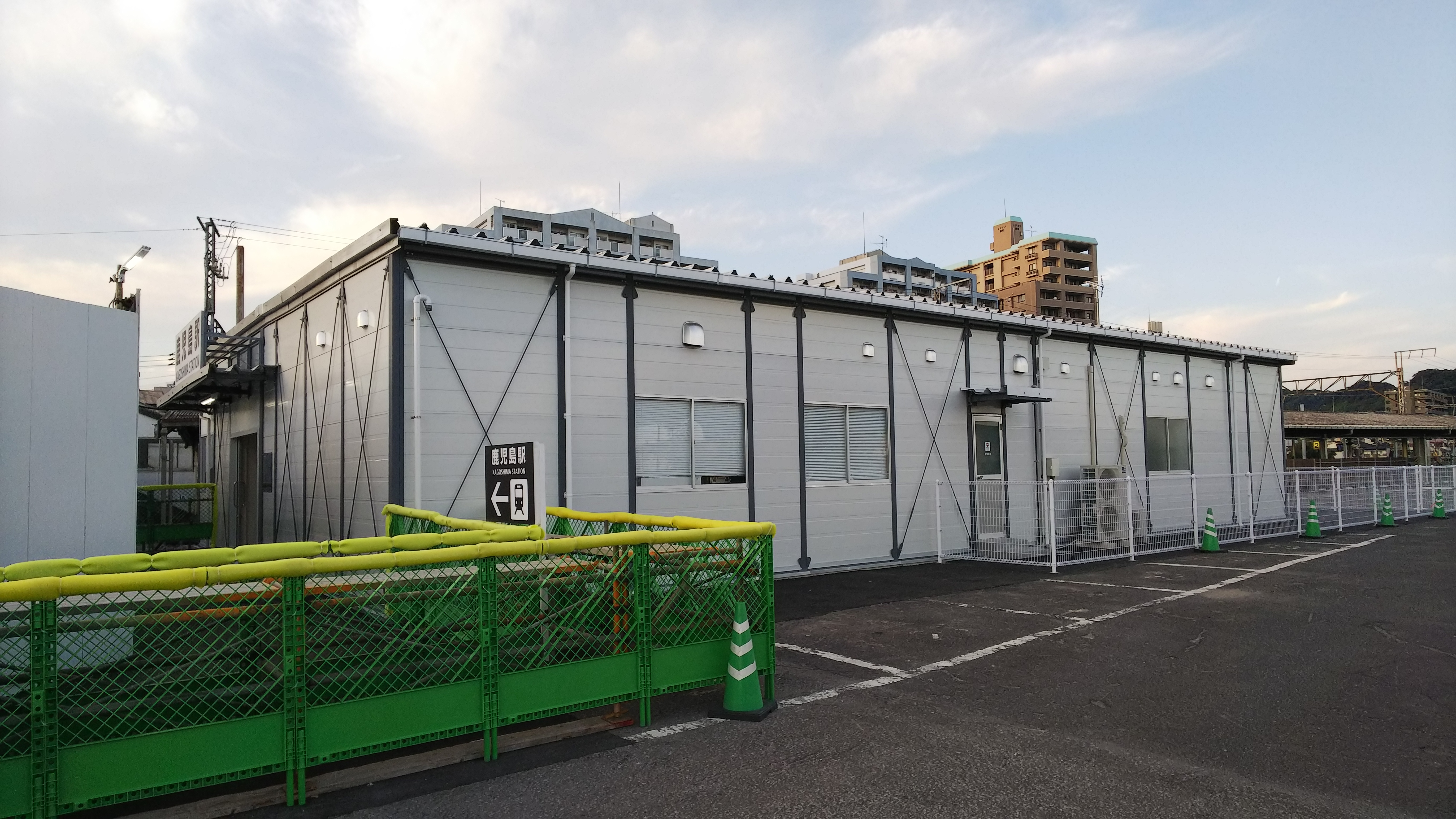 平成30年10月20日使用開始